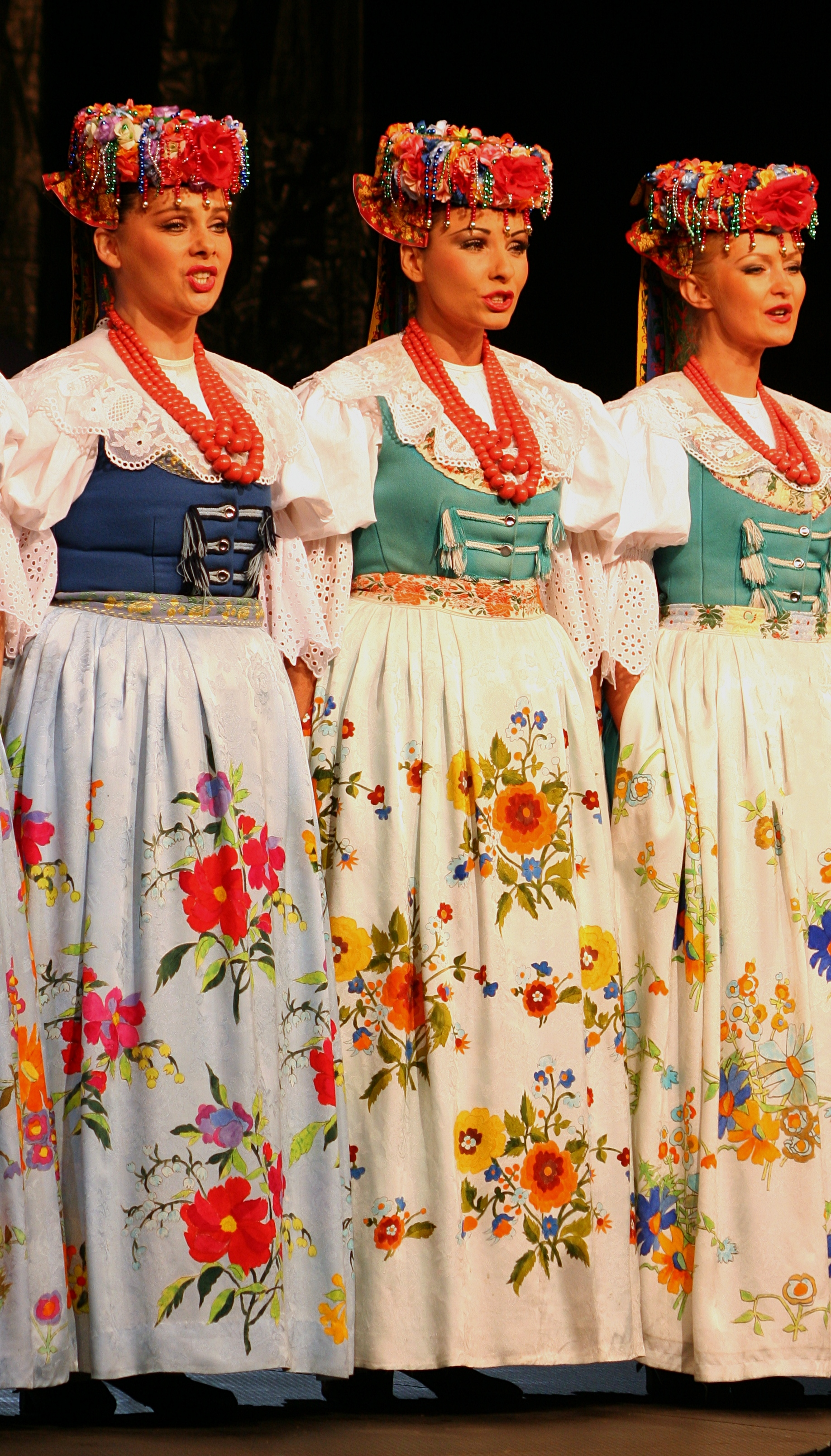 Artyści Zespołu Pieśni i Tańca Śląsk podczas występu z okazji 58 rocznicy zespołu